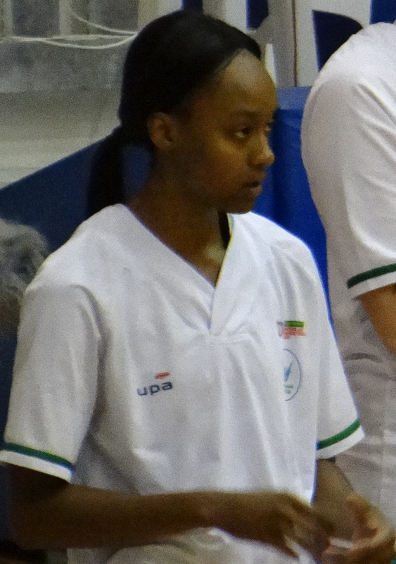 Fenerbahçe Women's Basketball vs Orman Gençlik TWBL 20171007